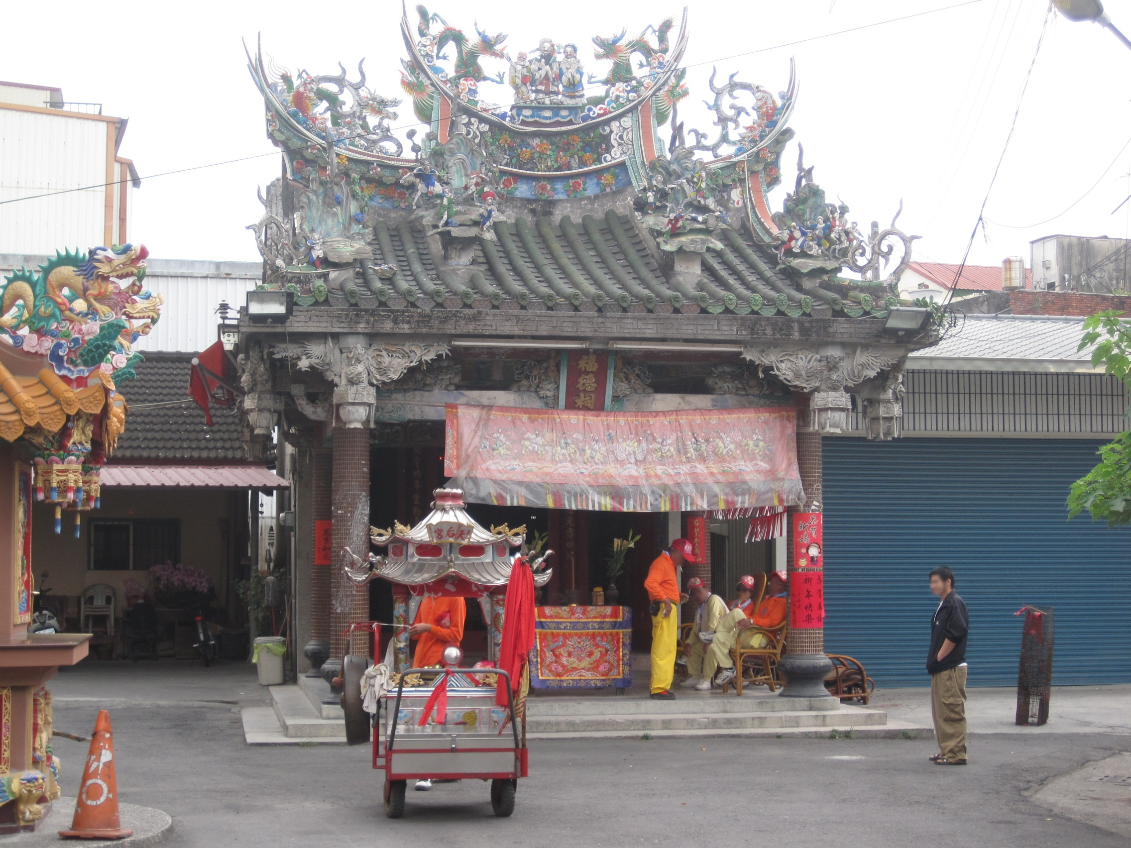 旗山福德宮